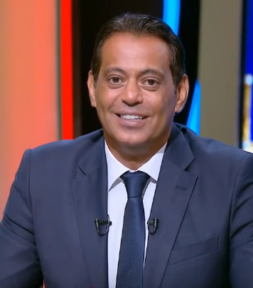 هاني رمزي لاعب كرة قدم مصري